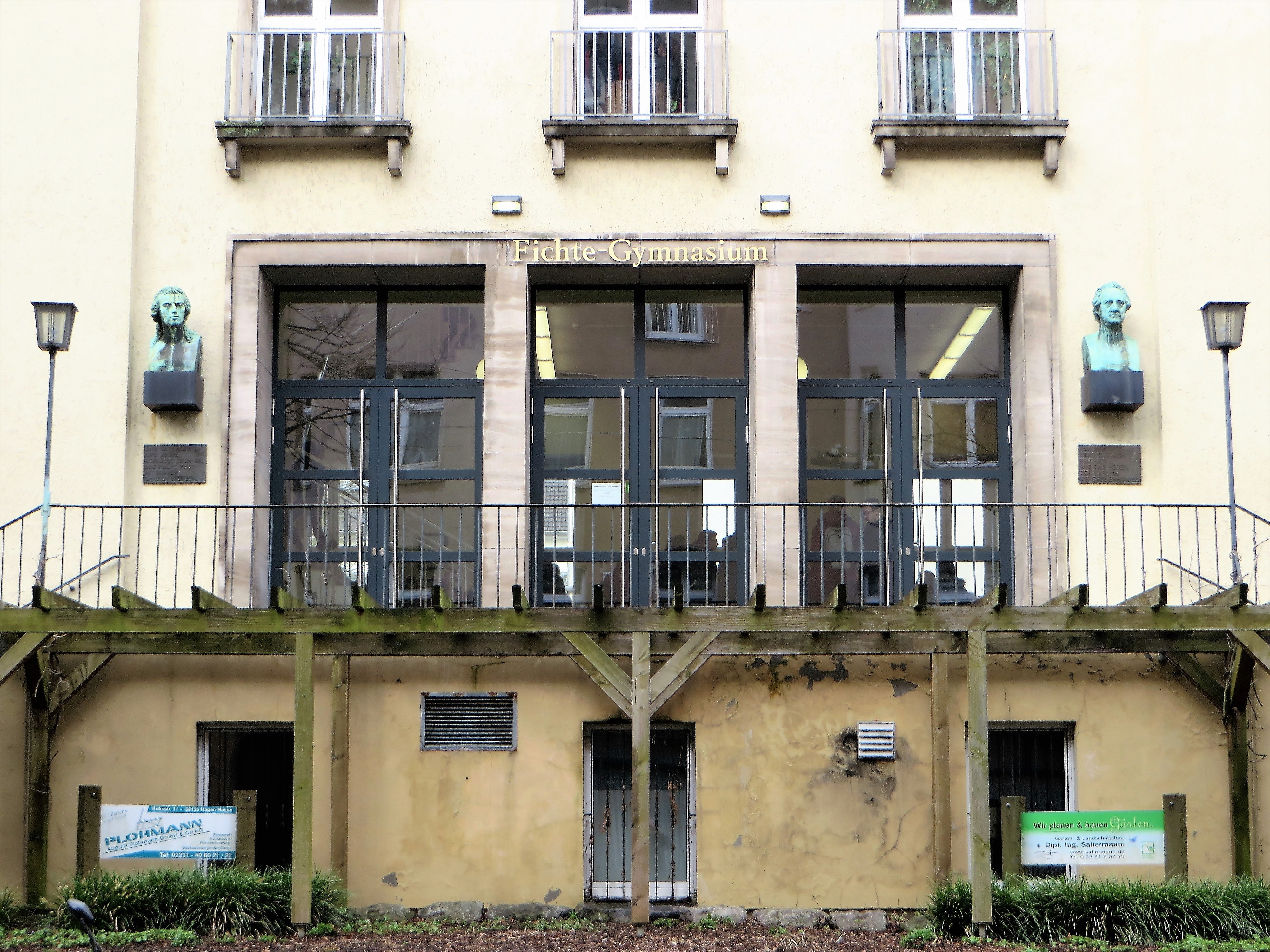 Haupteingangsbereich Fichte-Gymnasium Hagen, Goldbergstraße 20. Neben der rechten Tür mit einer Büste von J.W. Goethe, neben der linken eine Büste von F. Schiller.